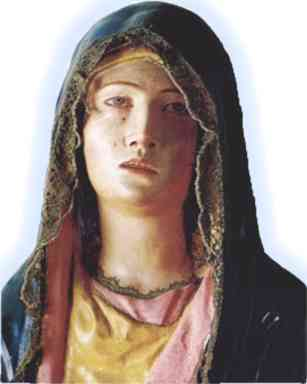 Virgen de las Lágrimas, patrona de Cabezo de Torres Contents 1 Summary 2 Datos técnicos 3 Licensing 4 Original upload log Summary Imagen del busto de la Virgen de las Lágrimas, patrona de Cabezo de Torres Este busto se puede encontrar junto al Sagrario de la parroquia de Cabezo, (Murcia) Datos técnicos Imagen modificada por Rutrus con MS Picture It! Esta imagen se dona con licencia